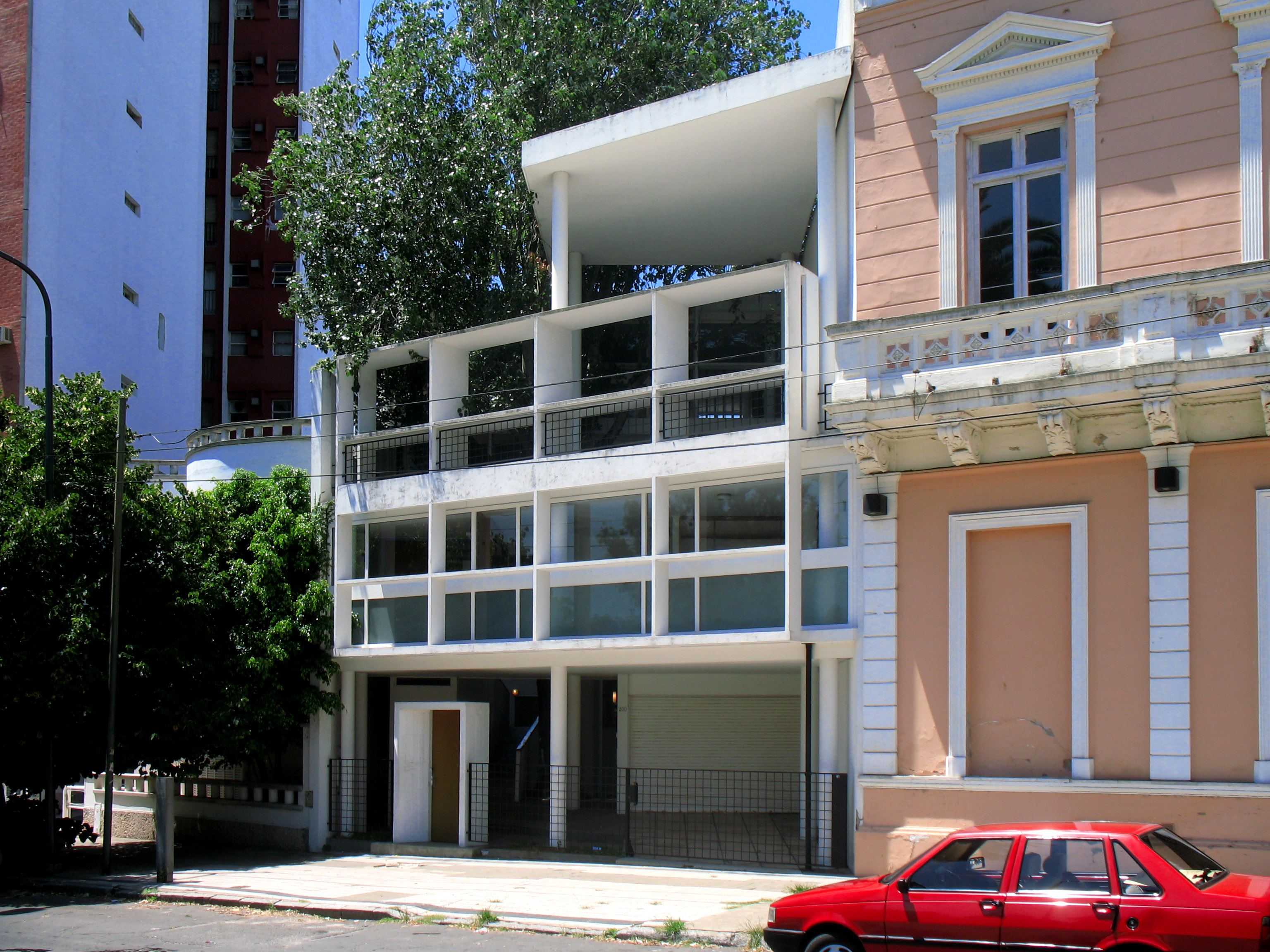 Le Corbusier (1887–1965). Casa Curutchet, La Plata, 1949–1953